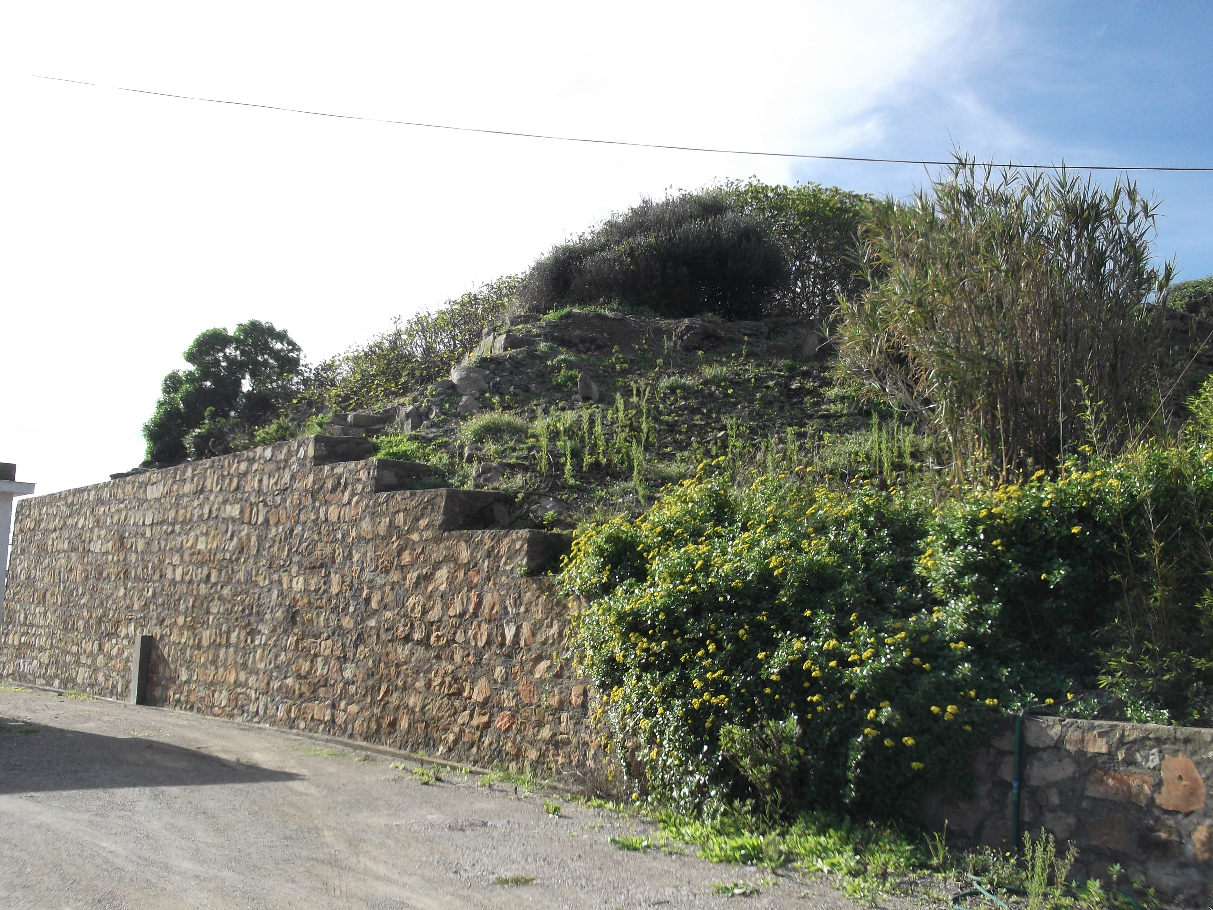 Restos del Fuerte de Punta Carnero en la actualidad. Algeciras, Andalucía, España